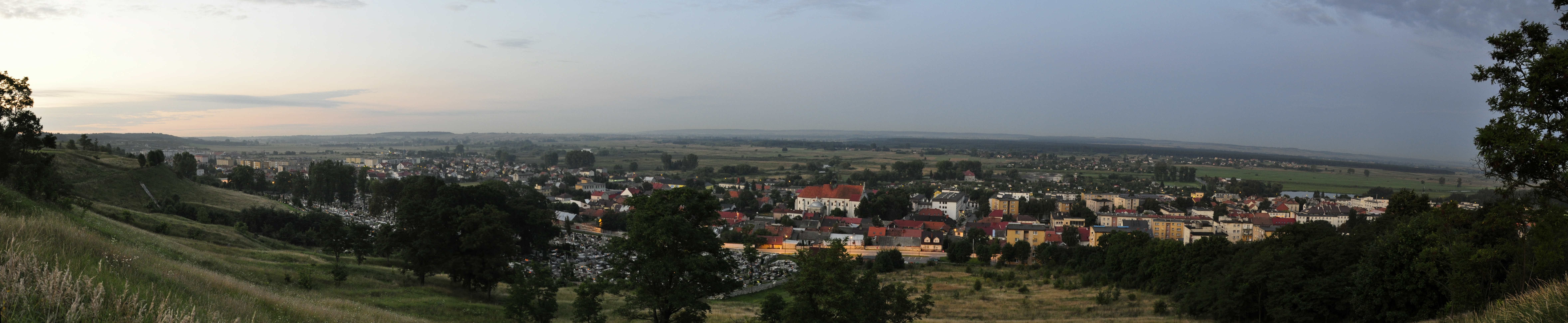 Pińczów panorama